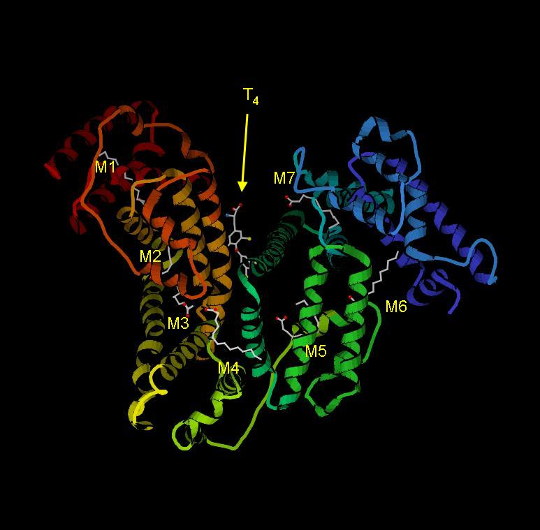 Albüminin miristik asit ve tiroksine bağlanmış hali. T4, tiroksin; M1-M5, miristik asit. Protein Databank'da [1] 1HK4 [2] kayıtlı koordinatların KiNG görüntüleyicisi ile elde edilmiş resmidir.